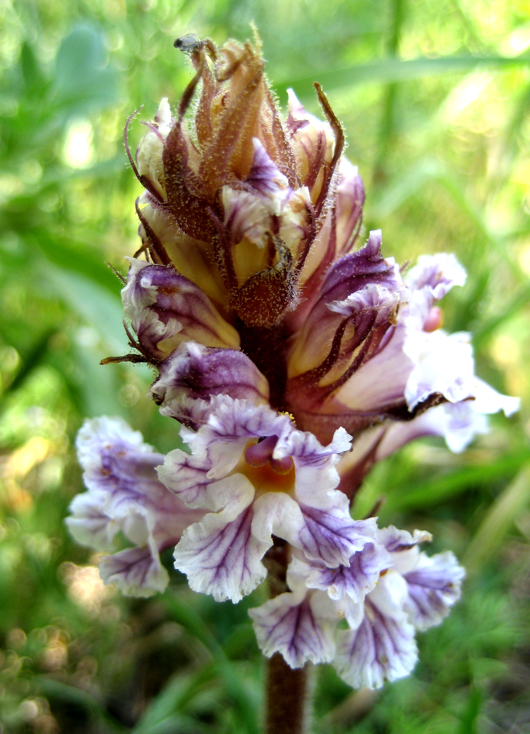 Orobanche crenata, Chios, Greece. Near Vrontados